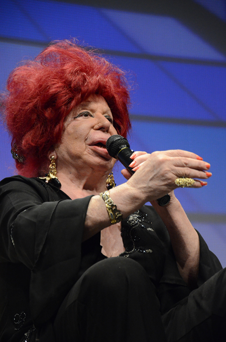 L'artista Carmen de Mairena al programa Visto lo visto TV.